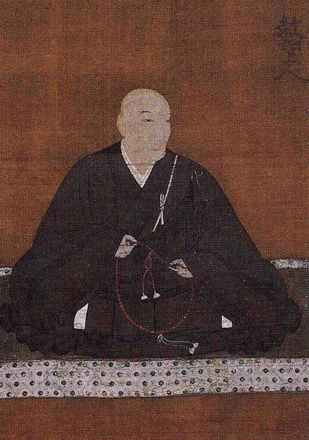 Image:Kyounyo.jpgの拡大画像